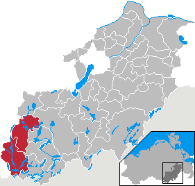 Amt Mirow in Mecklenburg-Vorpommern - District Mecklenburg-Strelitz (1992-2004)